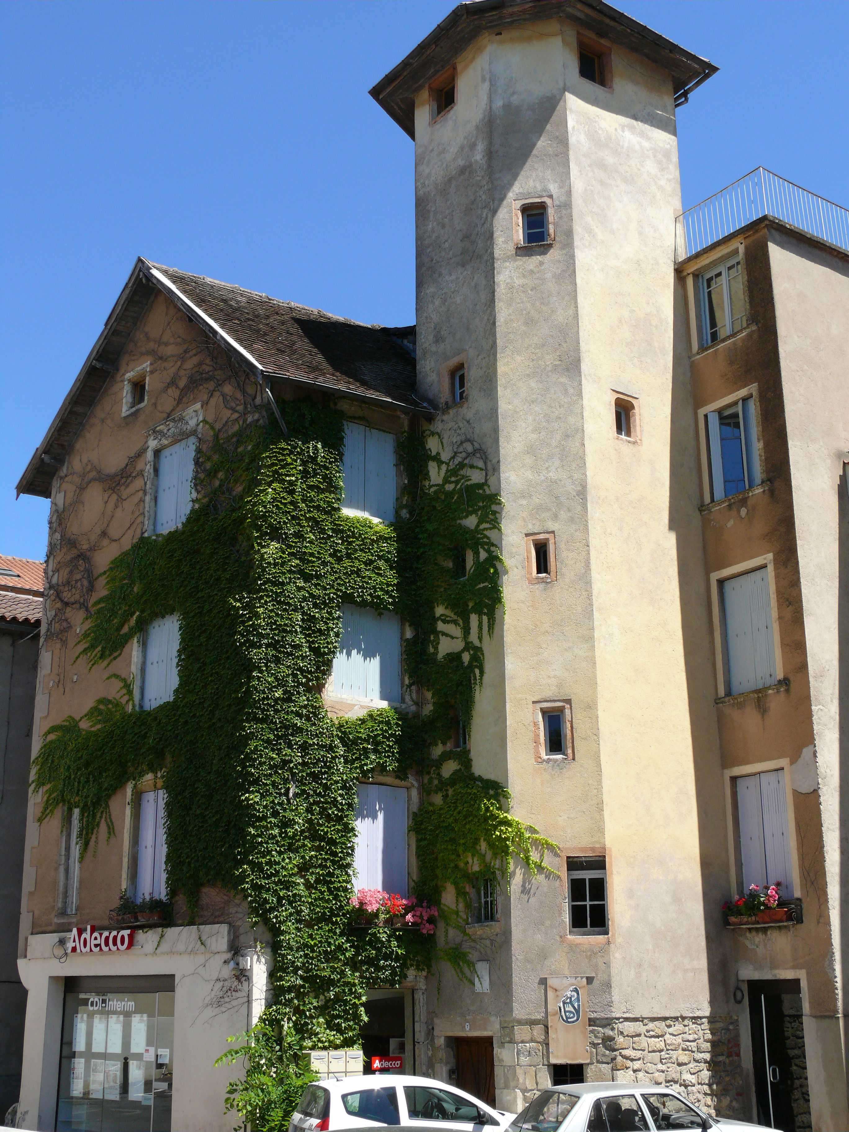 Villefranche-de-Rouergue - Place B. Lhez - Maison où a été fondée par Emilie de Rodat et trois compagnes l'Institut de la Sainte-Famille le 3 mai 1816